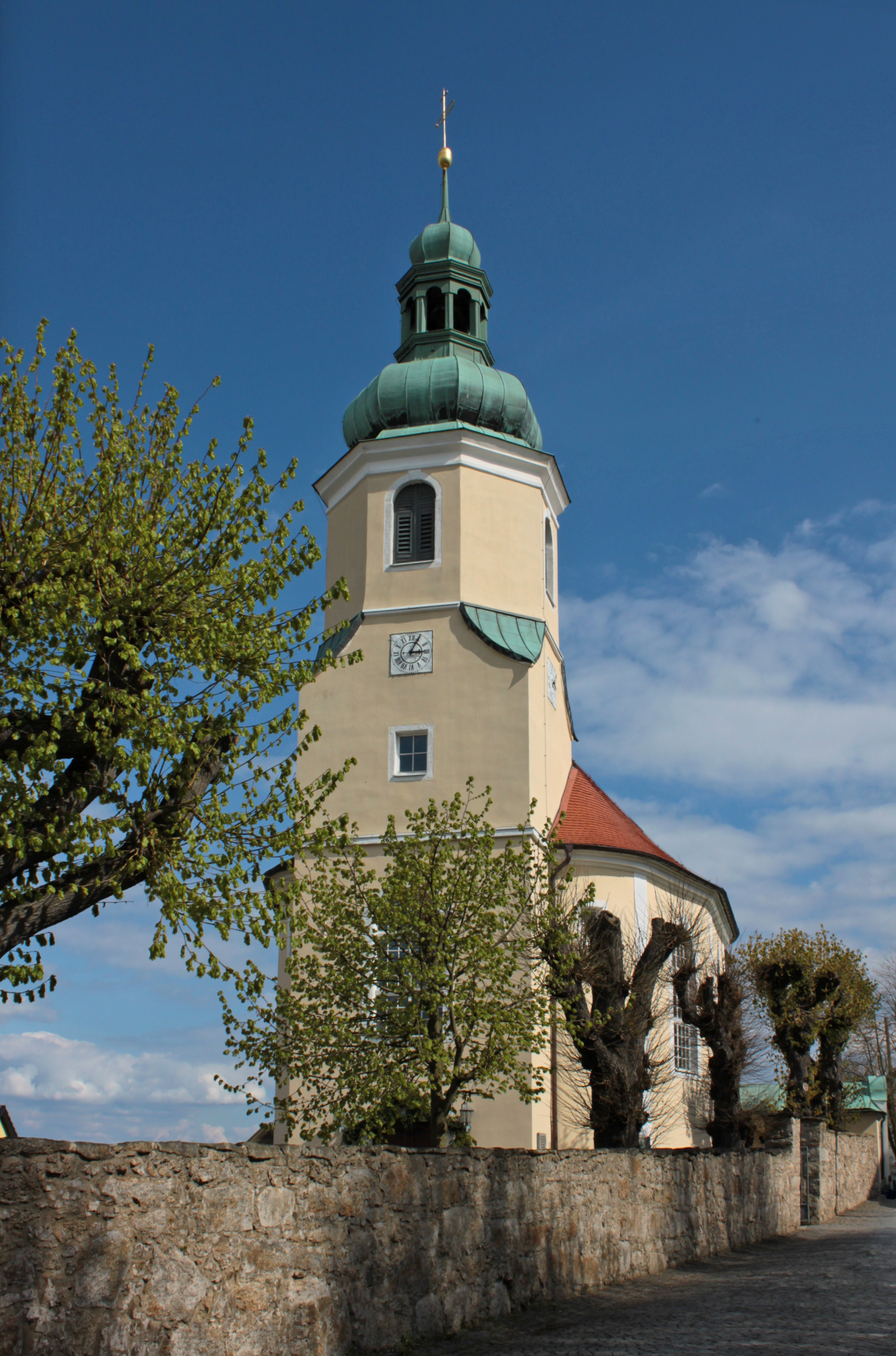 Römisch-katholische Kirche in Ostro, Gemeinde Panschwitz-Kuckau, Landkreis Bautzen. Hornjoserbsce: Cyrkej we Wotrowje, gmejna Pančicy-Kukow, wokrjes Budyšin.